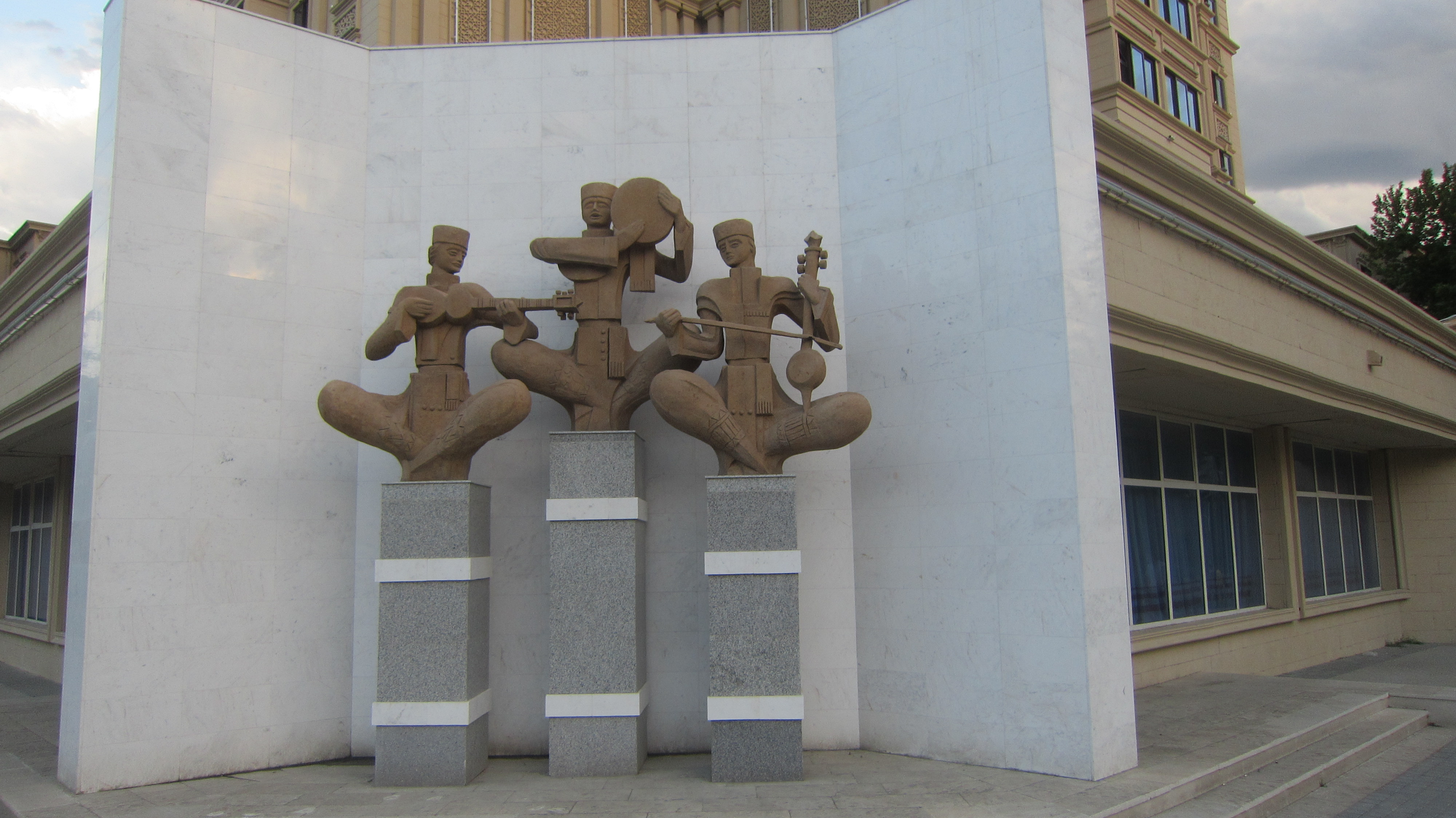 Muğam abidəsi(Mingəçevir)